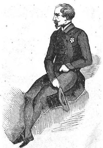 Louis-Napoléon Bonaparte en 1848, avant son élection à la présidence.